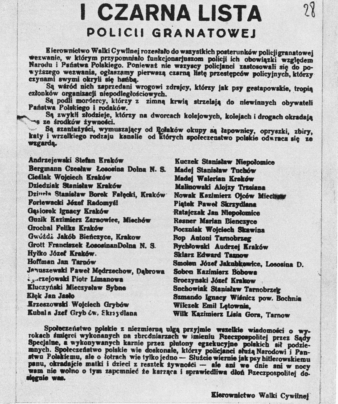 Ulotka - Czarna lista policji granatowej opublikowana przez Kierownictwo Walki Cywilnej w Krakowie.